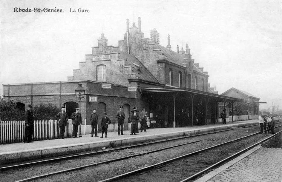 Intérieur de la gare de Rhode-Saint-Genèse au début des années 1900